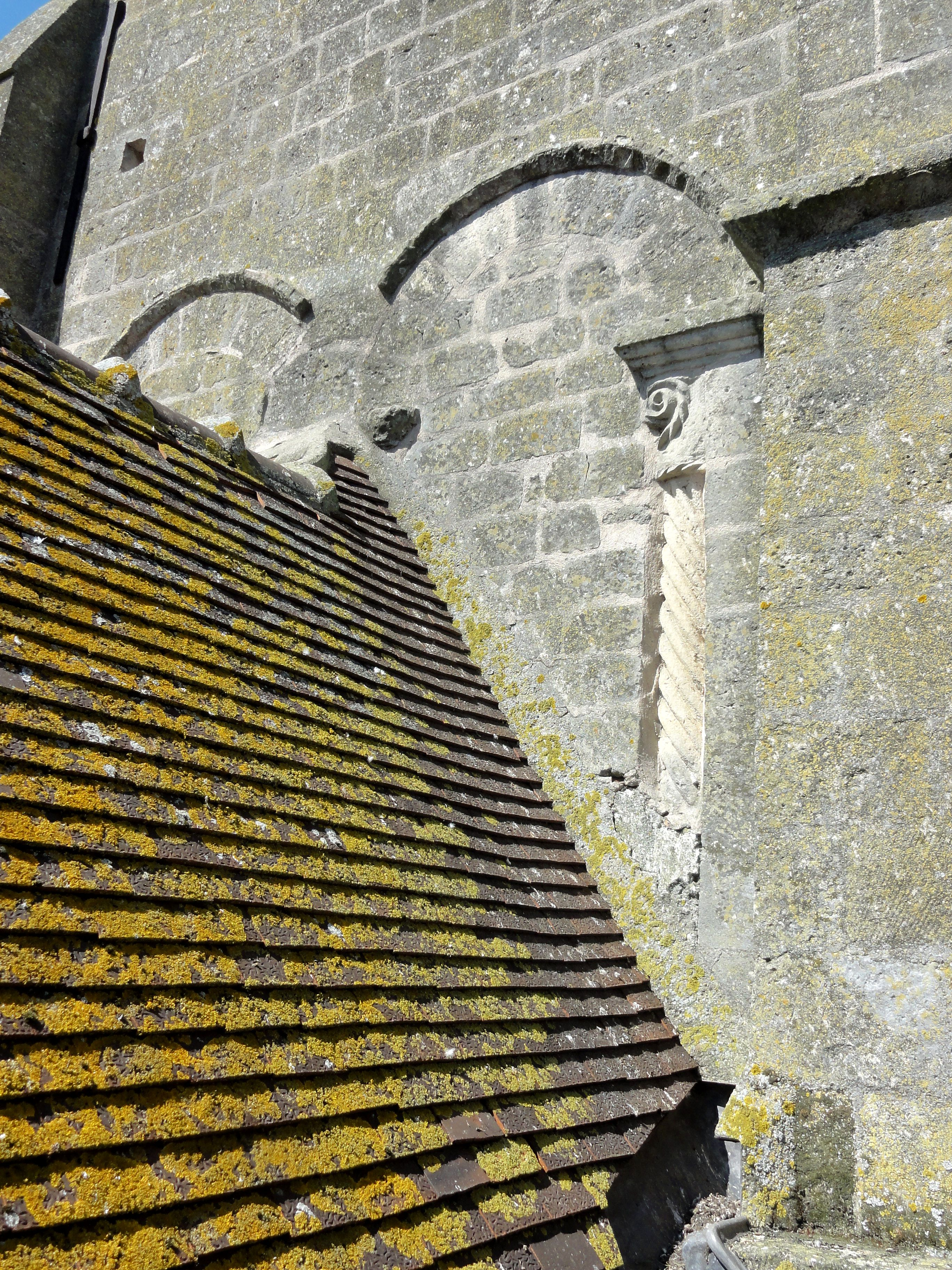 Clocher, 1er étage, côté sud.